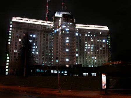 Toma nocturna del Hospital de Clínicas "Dr. Manuel Quintela".